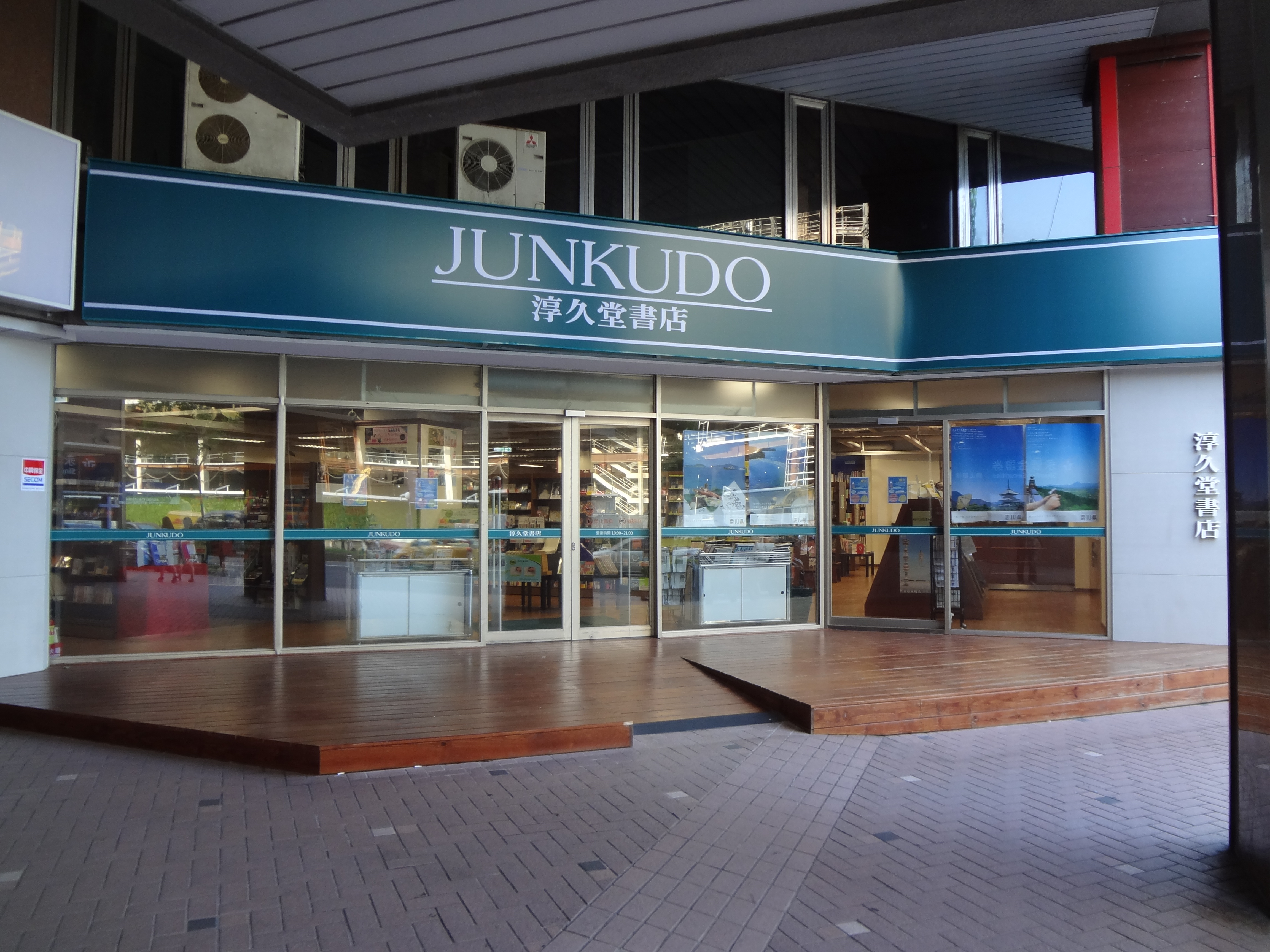 中文（台灣）: 淳久堂書店臺北光復南路店，位於臺北市大安區光復南路100號1樓（華視光復大樓）。